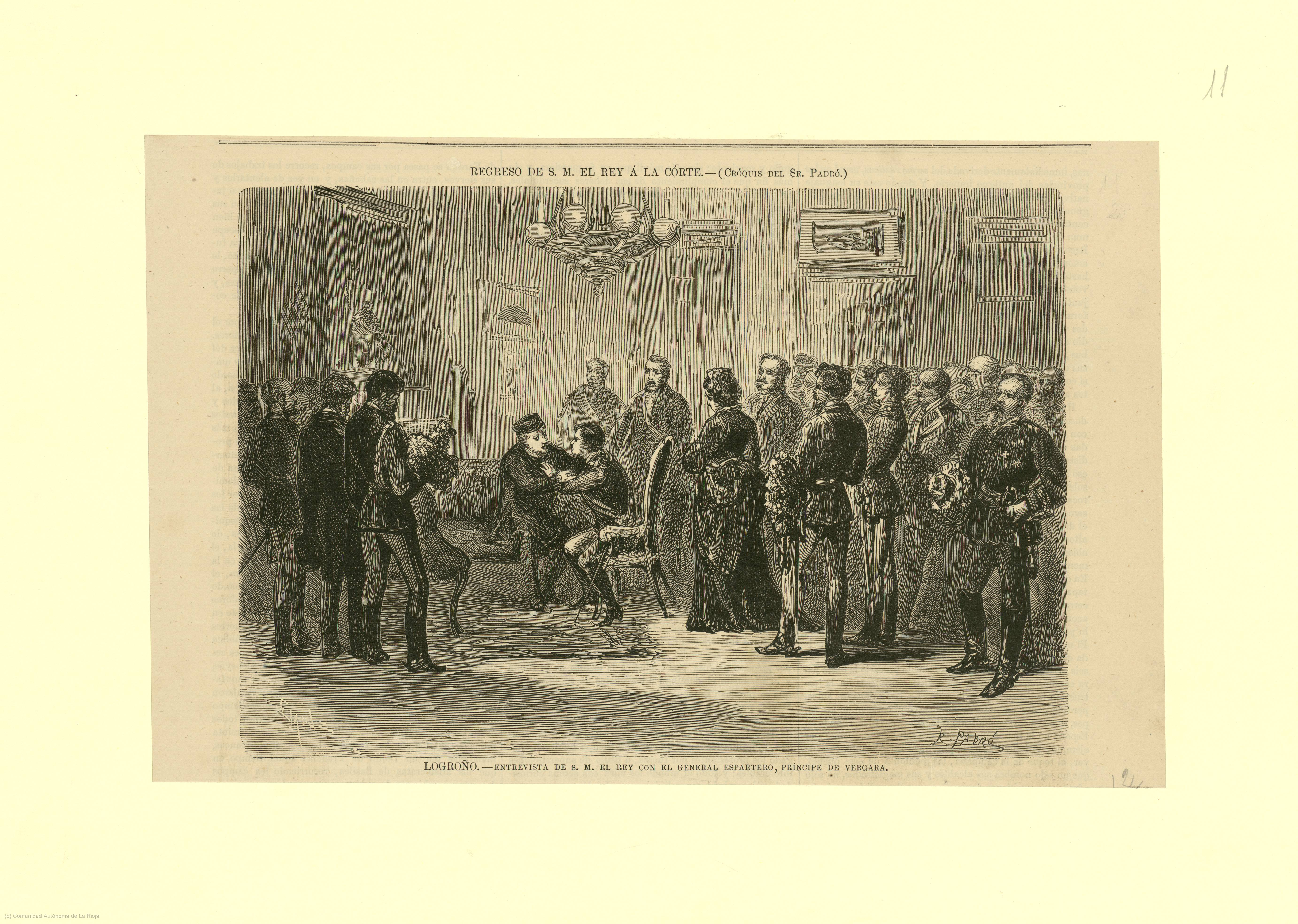 Entrevista de Alfonso XII con el General Espartero en Logroño, regreso del rey a la Corte (1875), obra del pintor español Ramón Padró y Pedret.